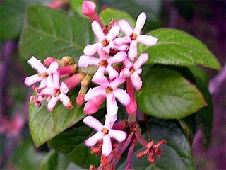 flores de palo cruz